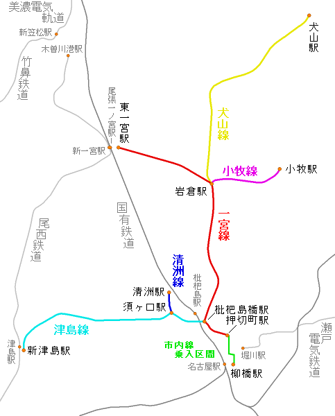 名古屋電気鉄道郡部線（郊外路線）の路線図。